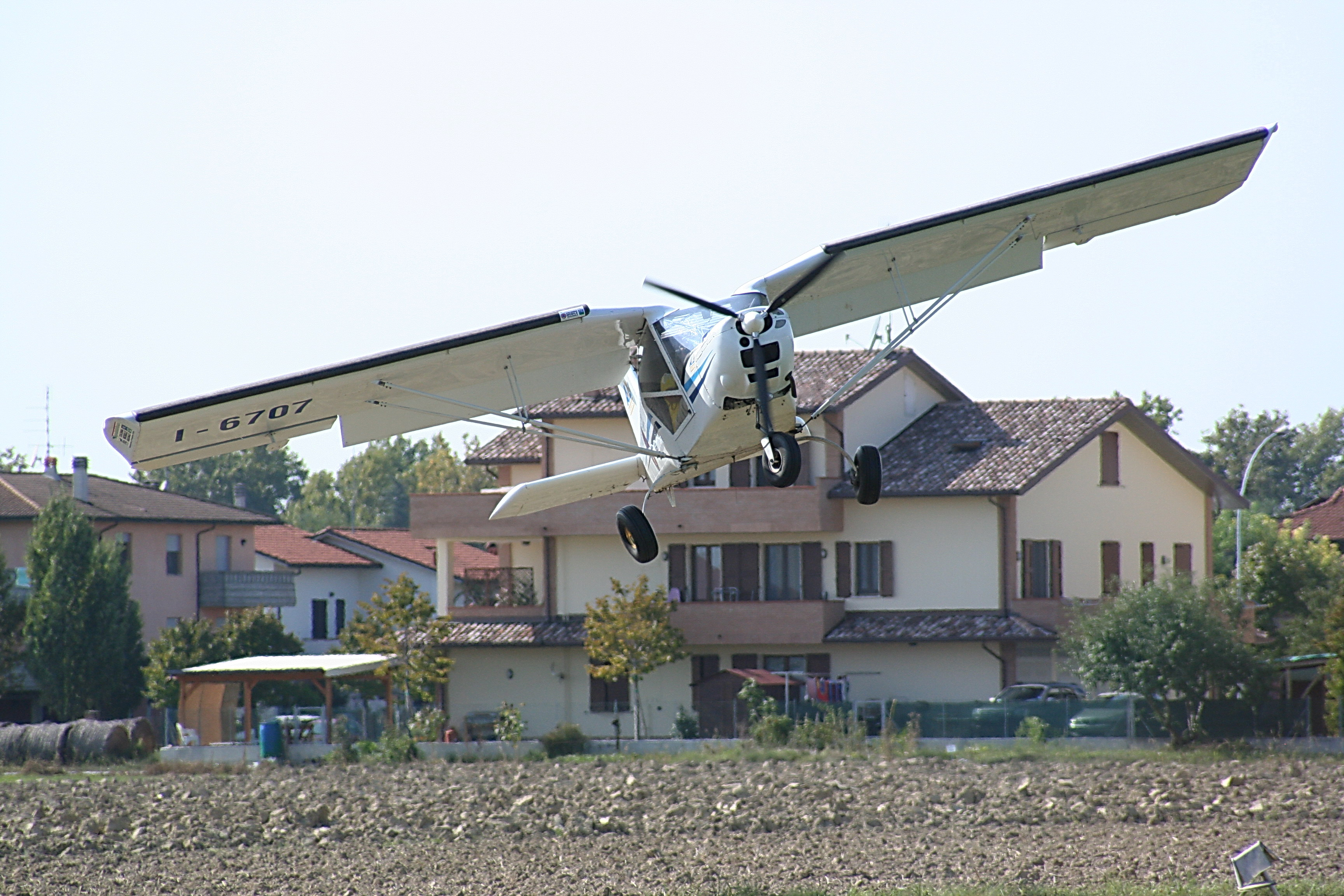 Aereo ultraleggero YUMA in atterraggio sull'aviosuperficie di Villafranca di Forlì. Sullo sfondo il paese